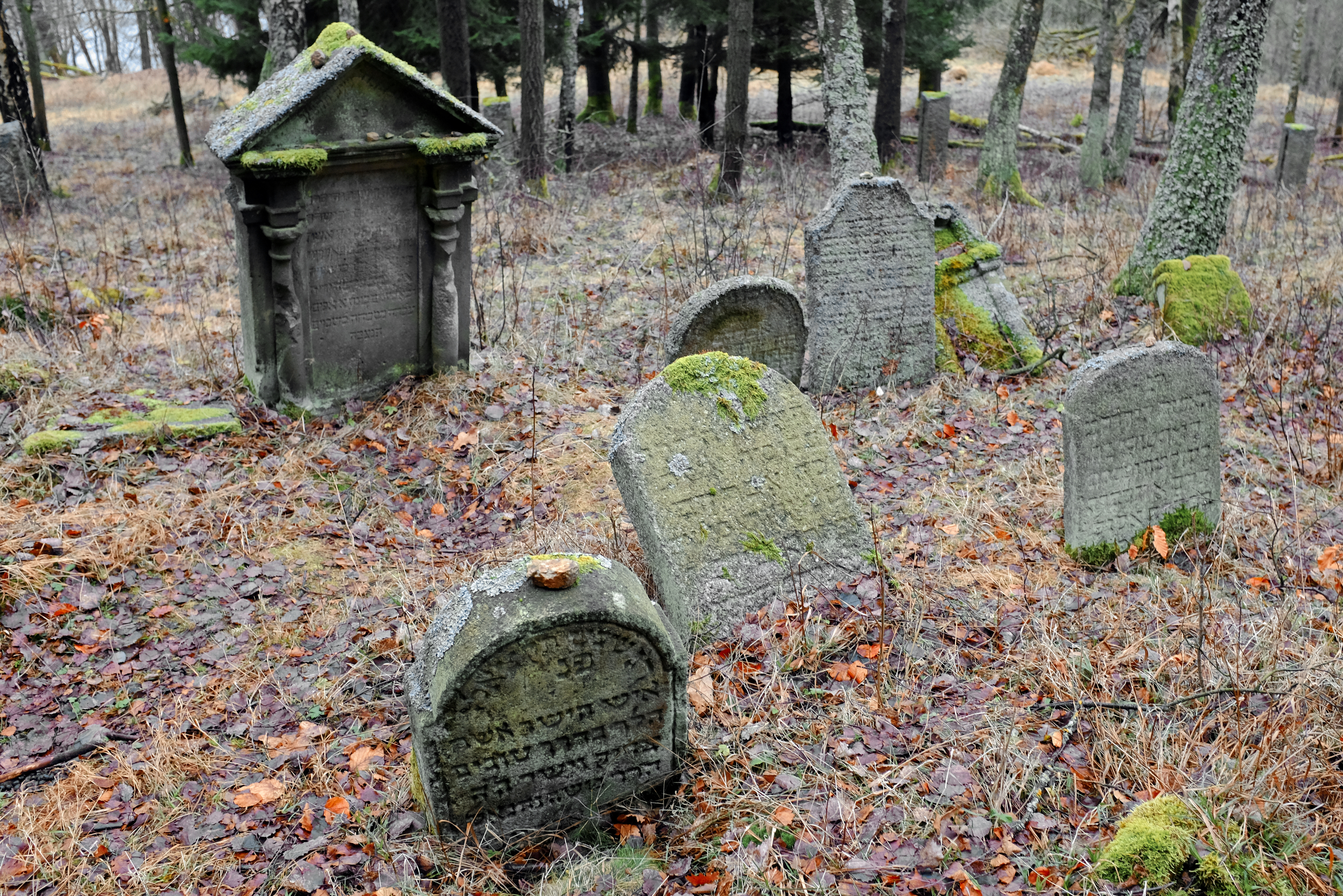 Krásná Lípa, zaniklá obec ve Slavkovském lese, bývalý židovský hřbitov, okres Sokolov